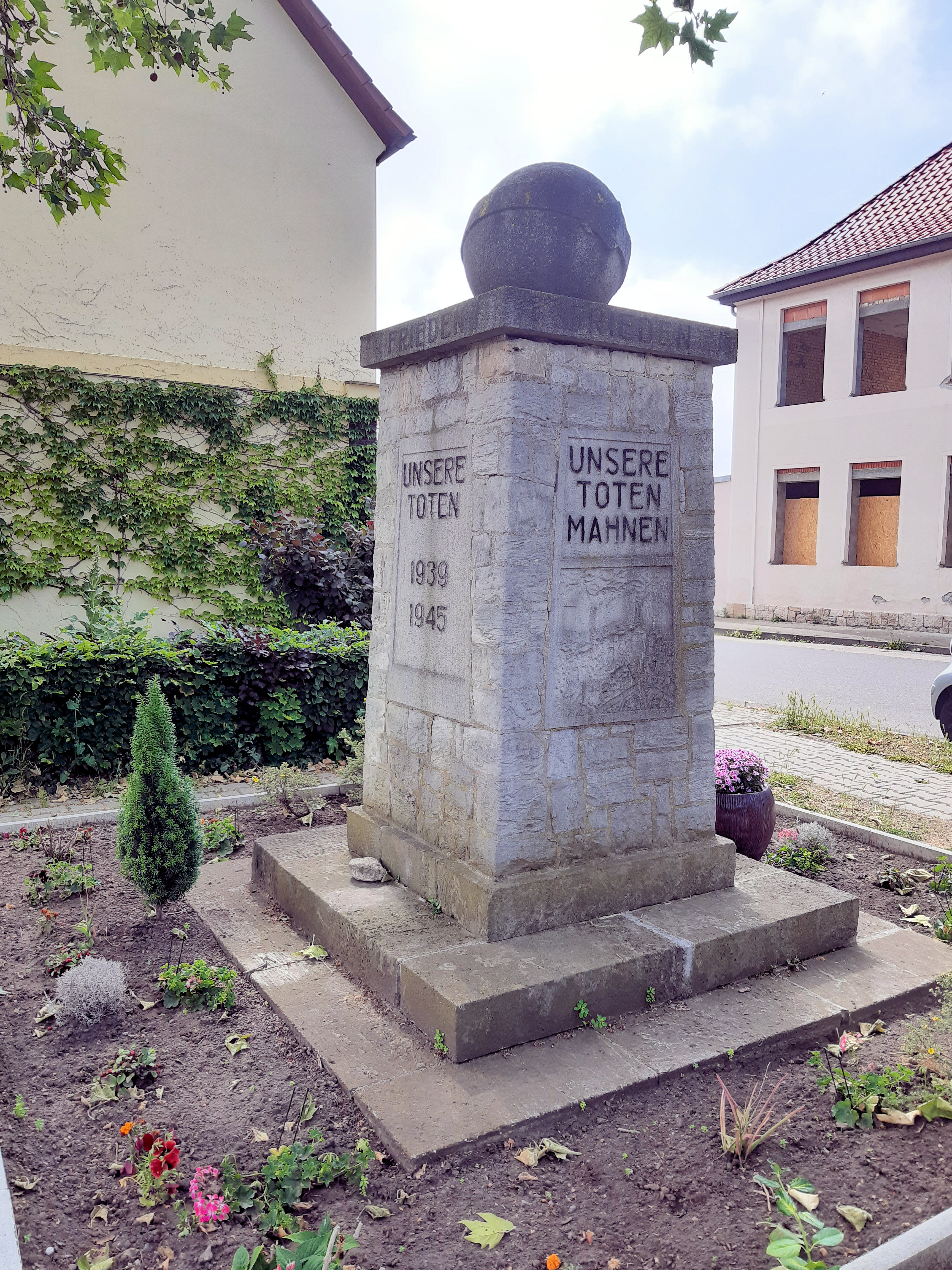 Denkmal für die Gefallenen des Ersten und Zweiten Weltkriegs, errichtet 1952, Teutschenthaler Straße, Zscherben, Gemeinde Teutschenthal